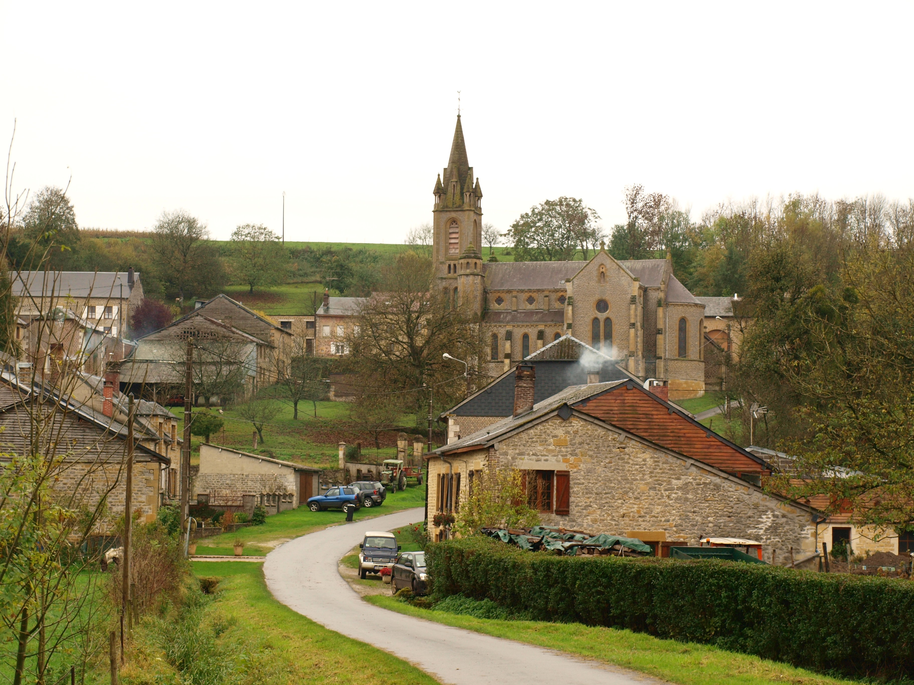 Louvergny (Ardennes, France) ; vue générale